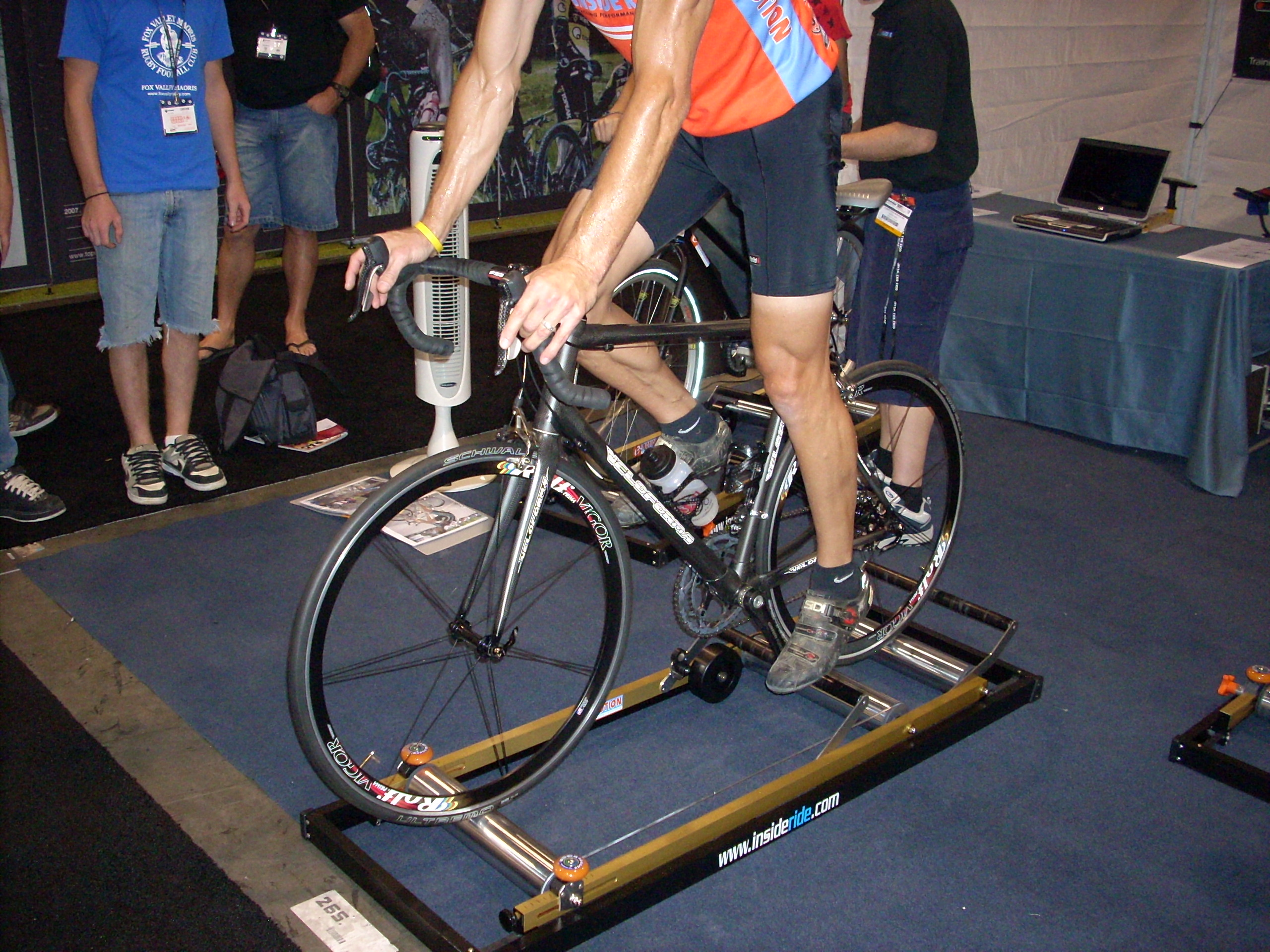 Indoor trainer